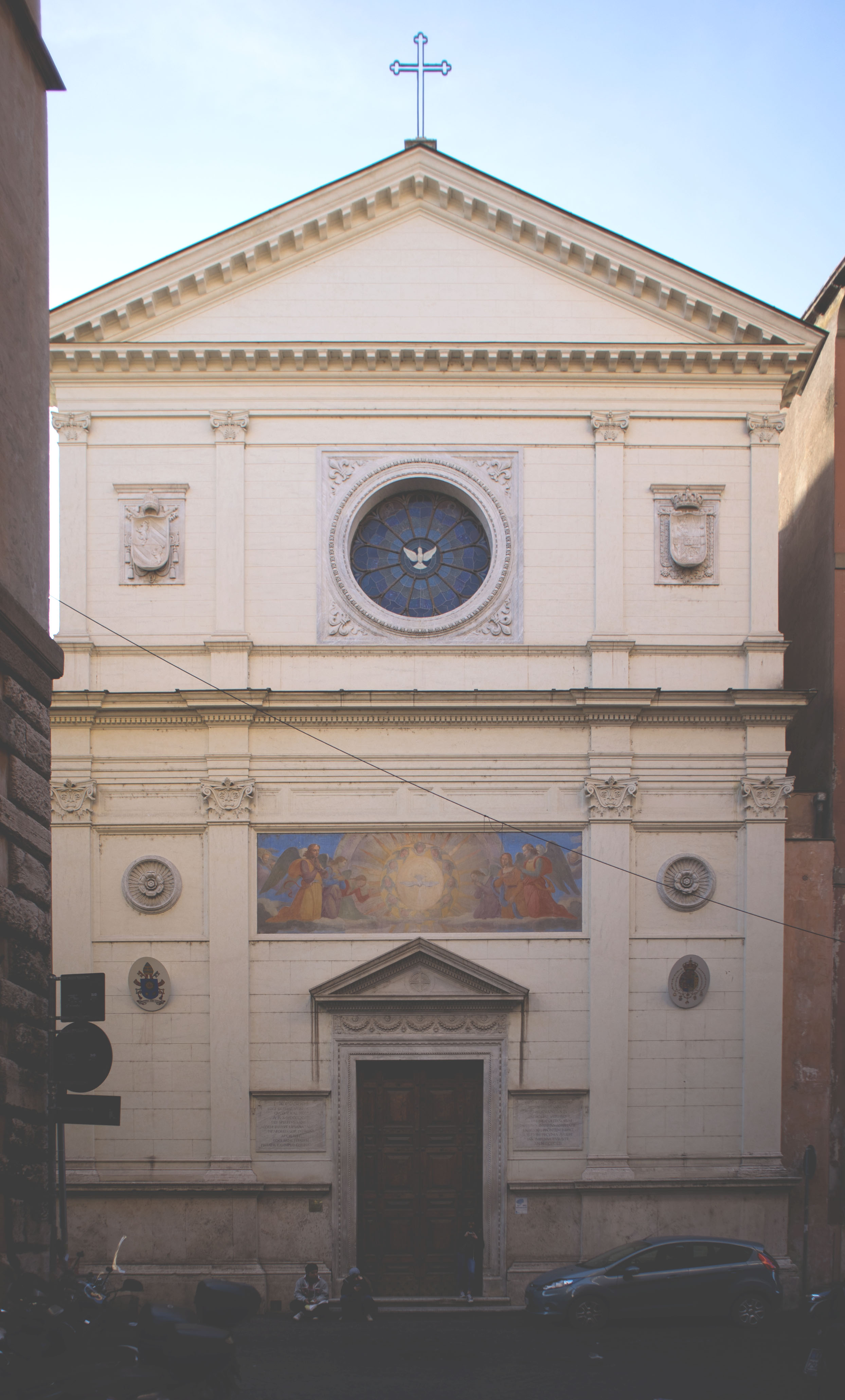 Facciata della Chiesa dello Spirito Santo dei Napoletani